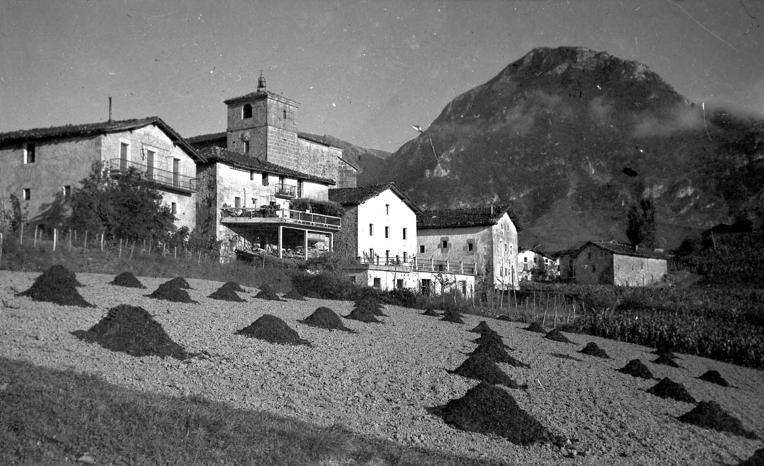 Abaltzisketa eta Txindoki, 1943an.